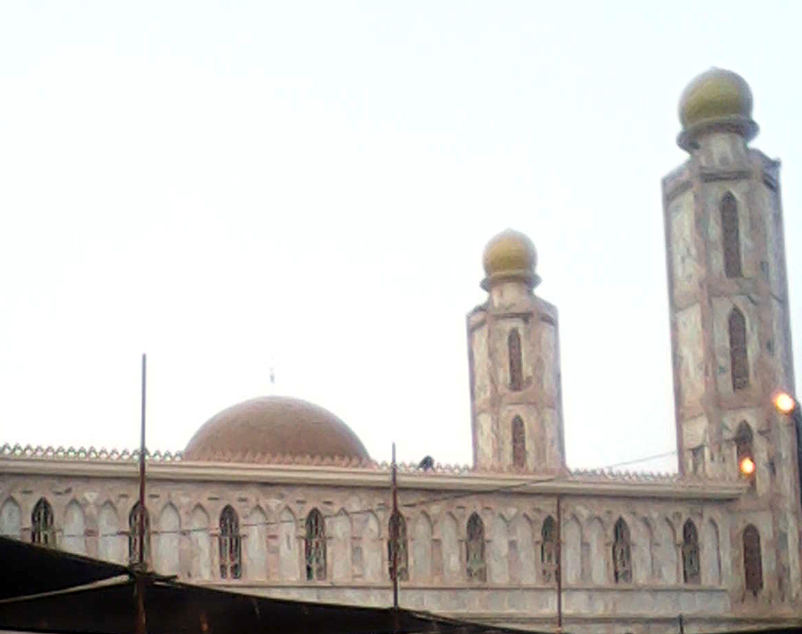 Autre aperçu de la mosquée Serigne Babacar Sy